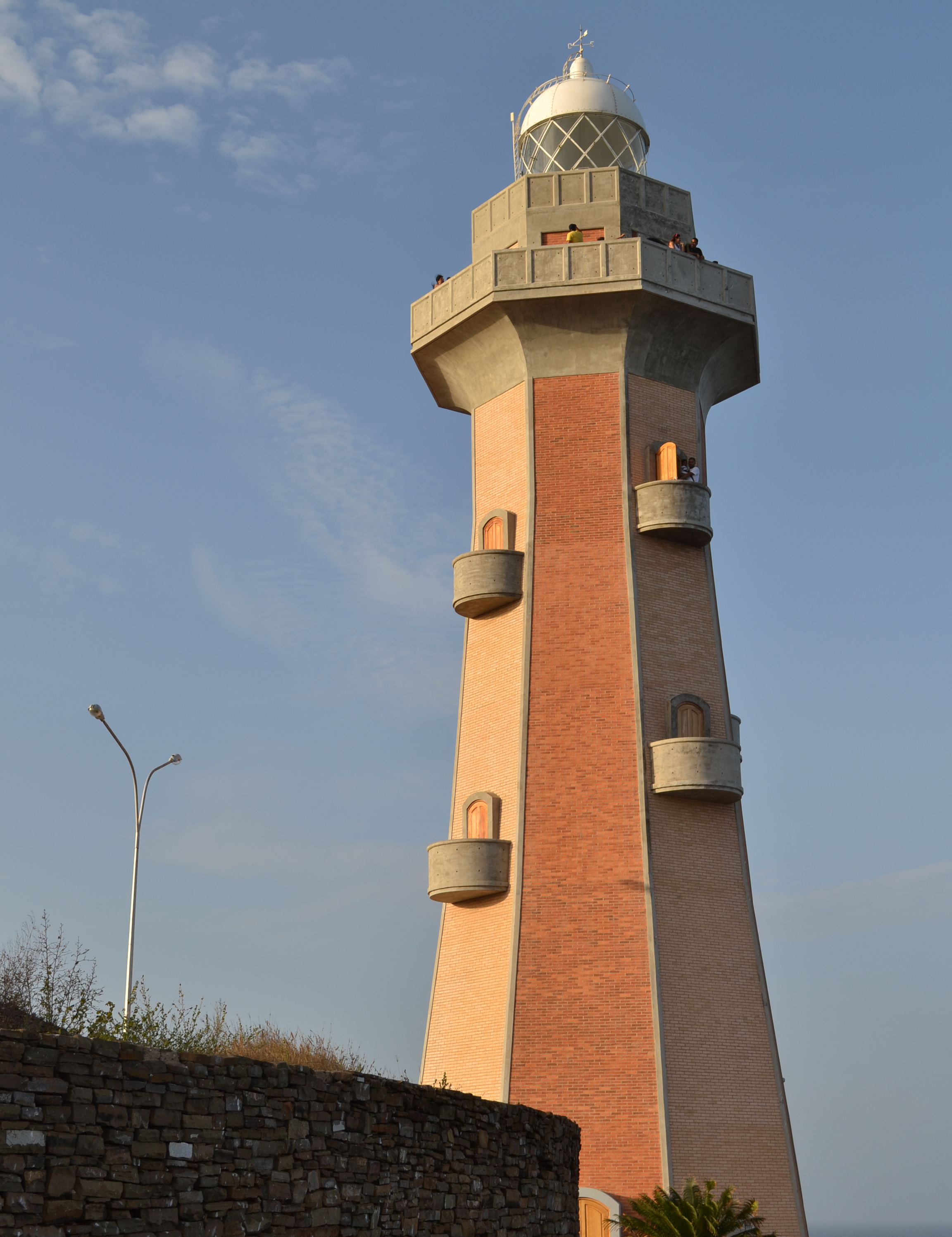 inspirado en los hermosos sitios turísticos del Edo. Nueva Esparta